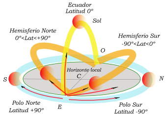 AUTHOR: Francisco Javier Blanco González PAÍS: España (Kingdom of Spain) IMAGEN: trayectoria del Sol según la latitud, en el equinoccio. Image made by Inkscape (.svg to .png) DATE: MAY.2006